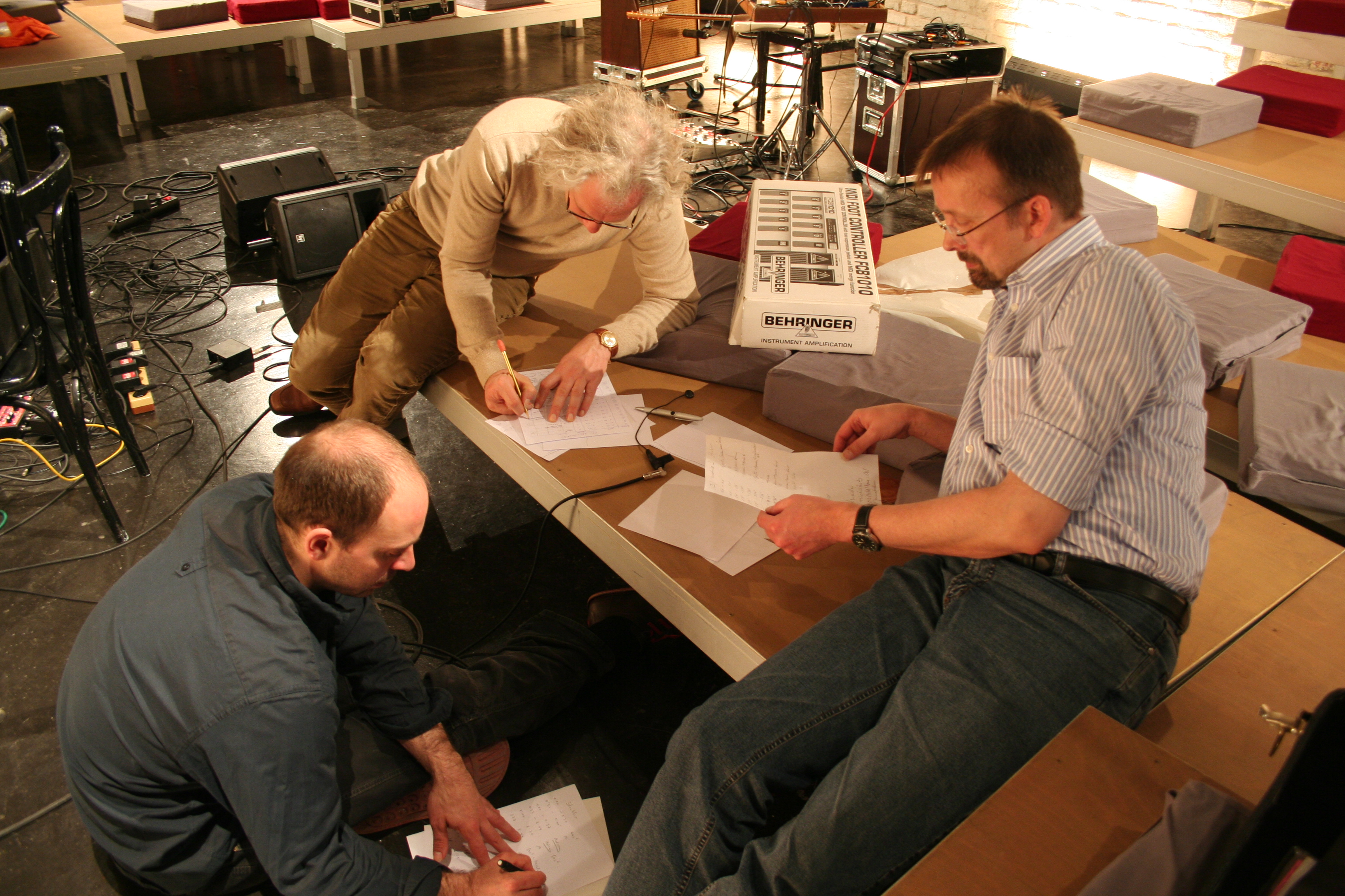 Vorbereitung für Improvisationskonzert mit Richard Barret in der Münchner T-U-B-E